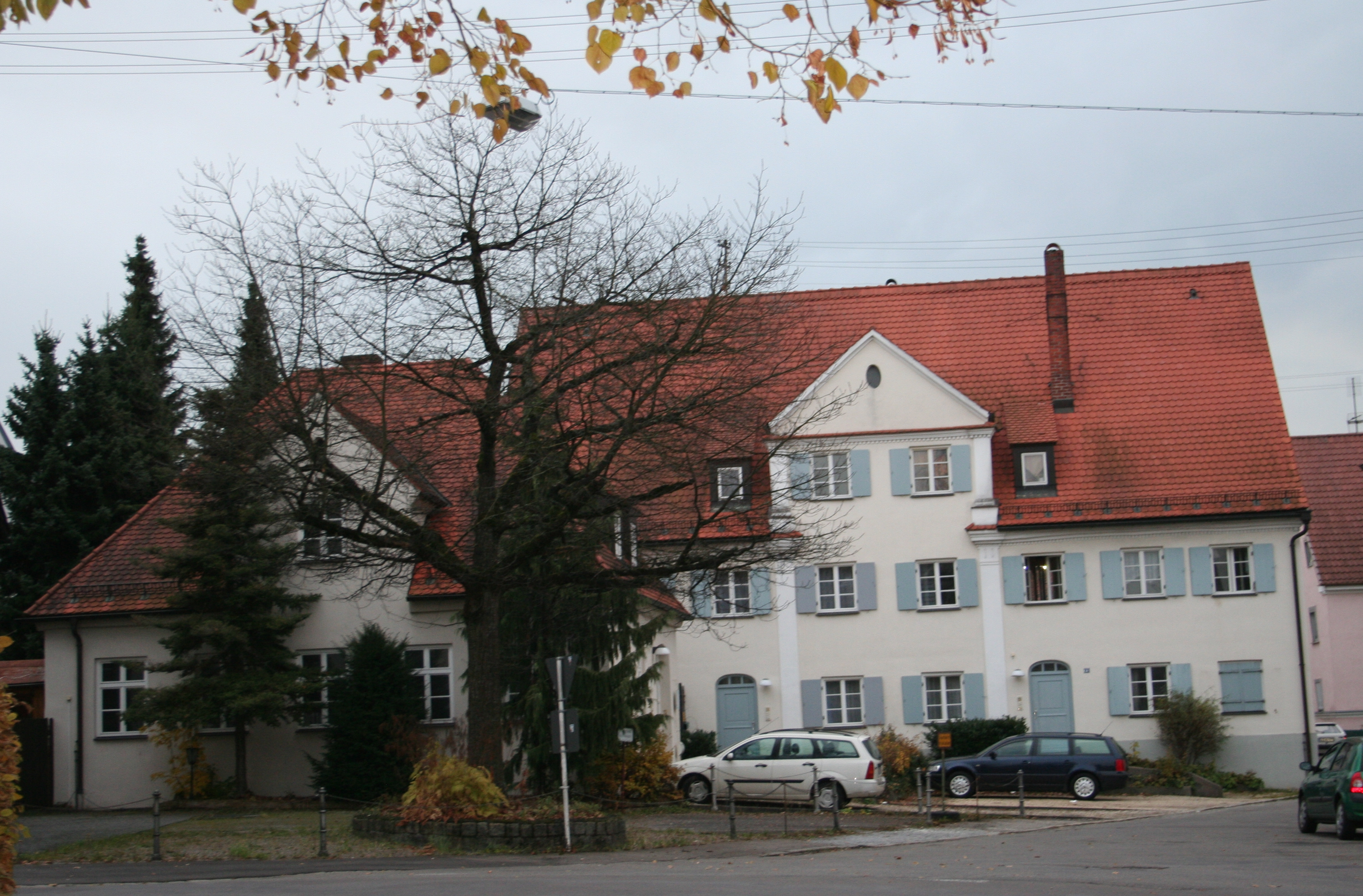 Krumbach Heinrich-Sinz-Straße 14/16 (Doppelwohnhaus; Baudenkmal)